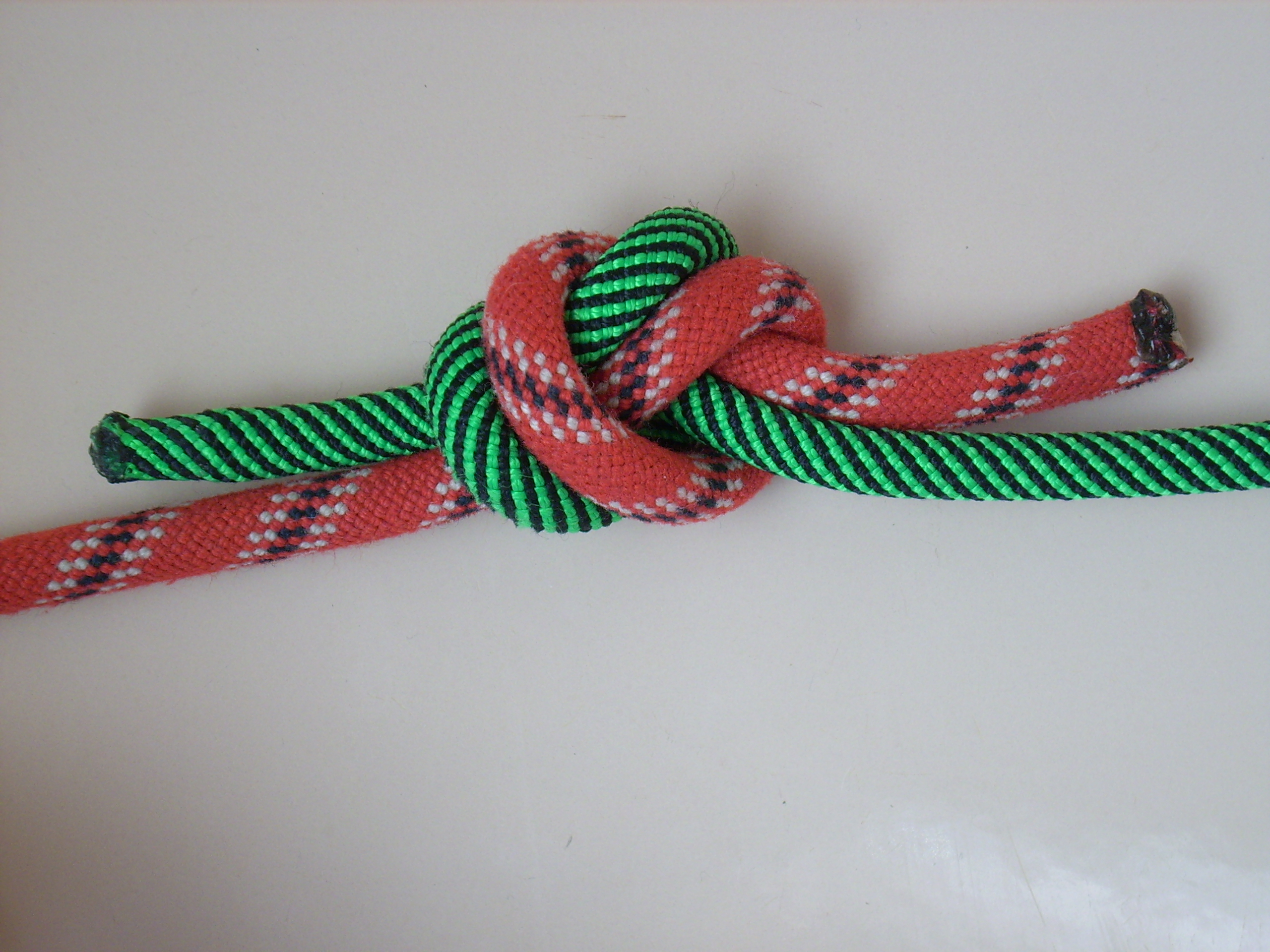 Sackstich gesteckt, zur Verbindung von zwei Seilen